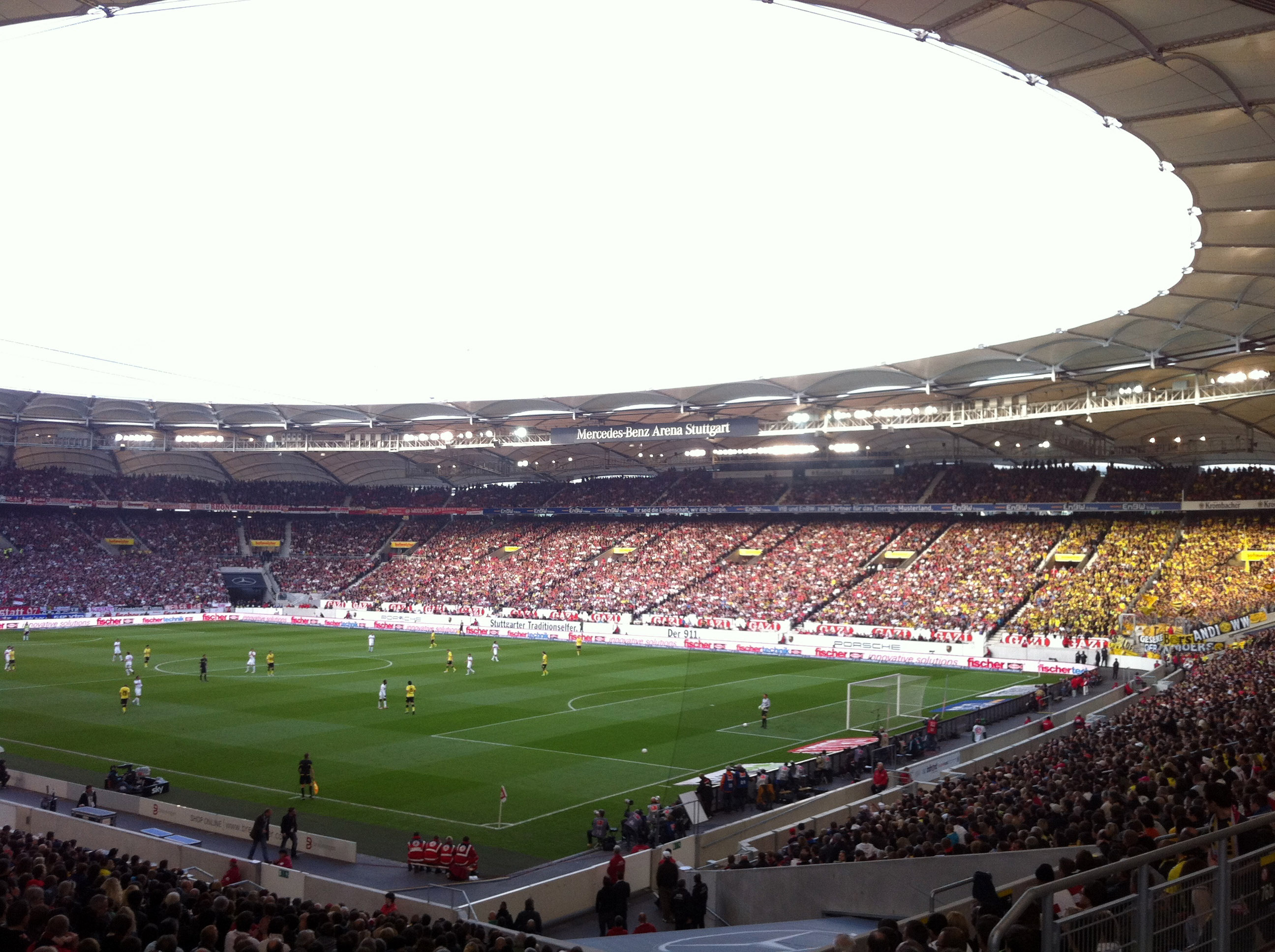 Mercedes-Benz-Arena, Stuttgart; VfB Stuttgart - Borussia Dortmund 1:1; 29. Oktober 2011